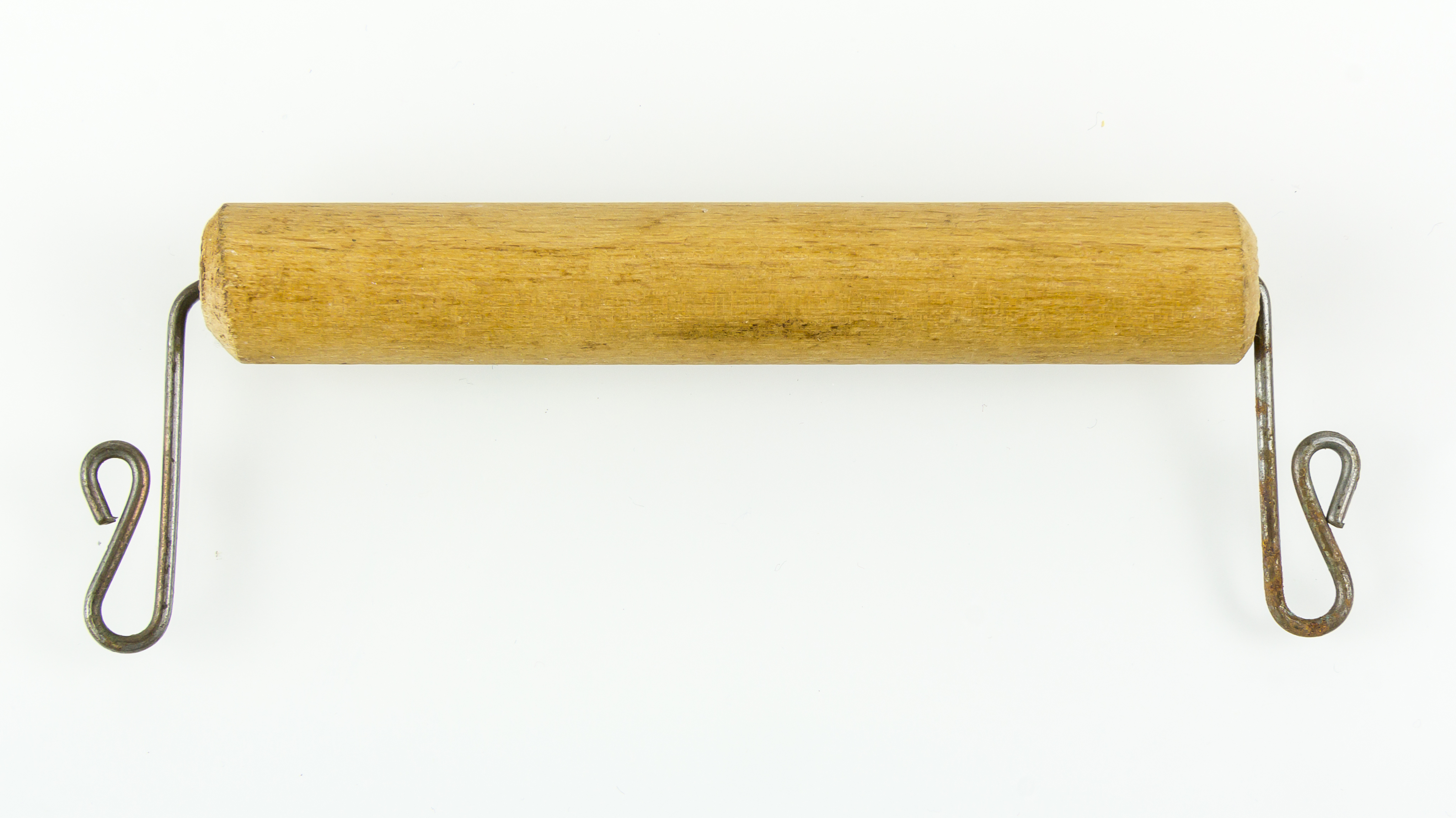 Henkel, Paketgriff